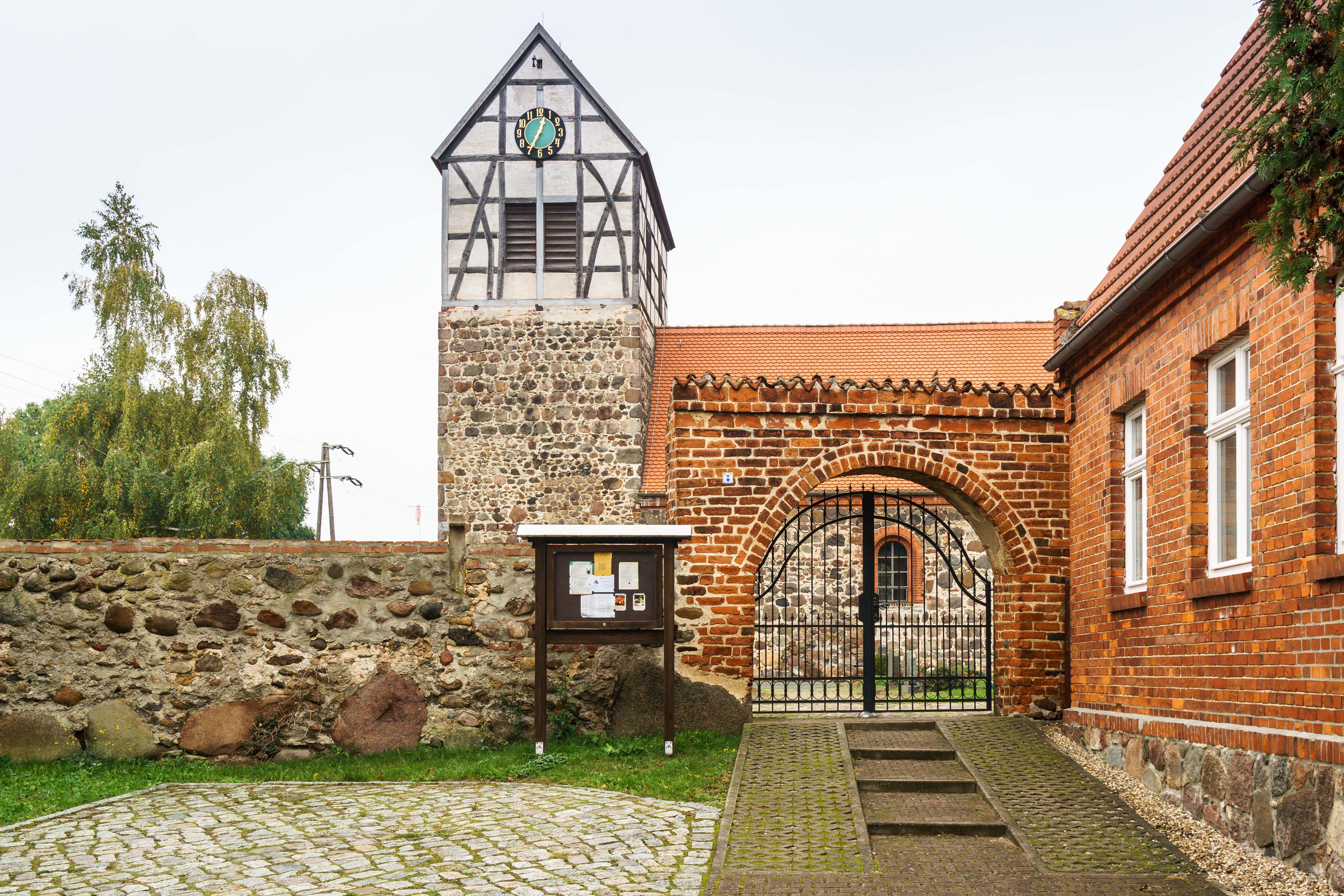 Steinkreuz, teilweise eingemauert in der Kirchhofsmauer von Borstel